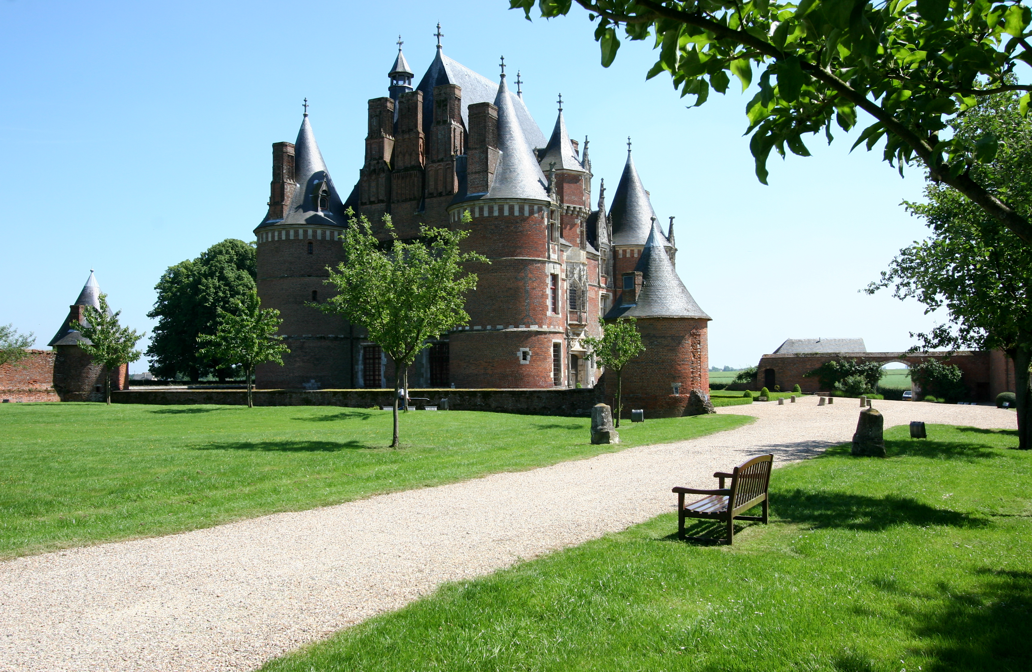 Chateau de Martainville, vue de coté, Normandie, France